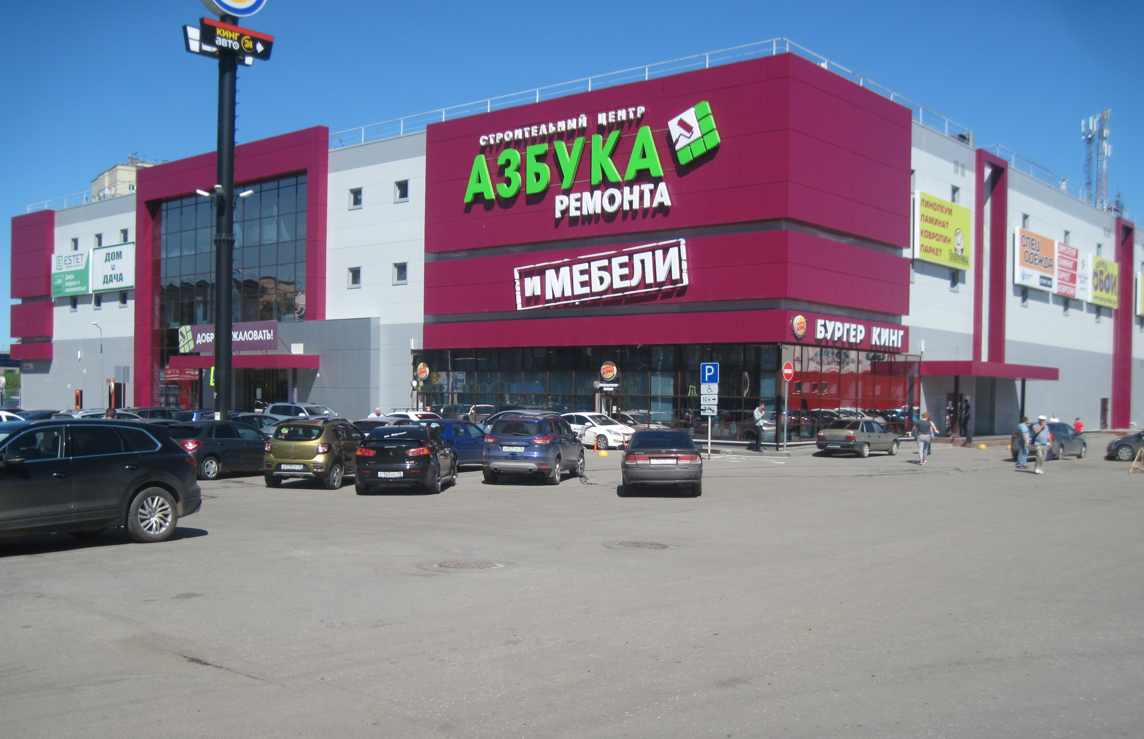 Ижевск,ул.Молодёжная,107Б.Строительный центр "Азбука ремонта".